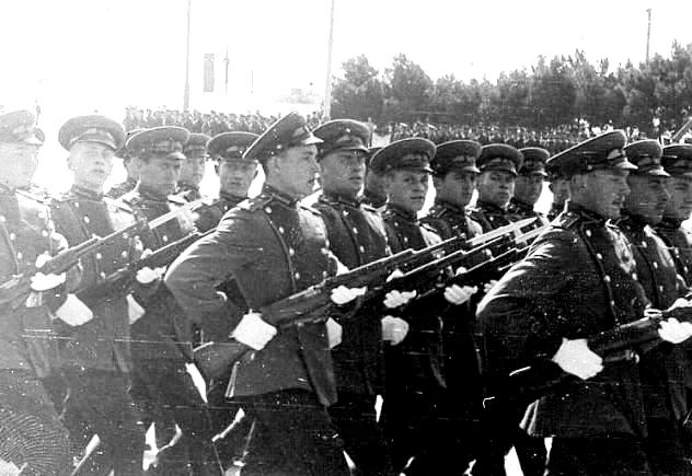 Рота почетного караула на параде, 1966 г.